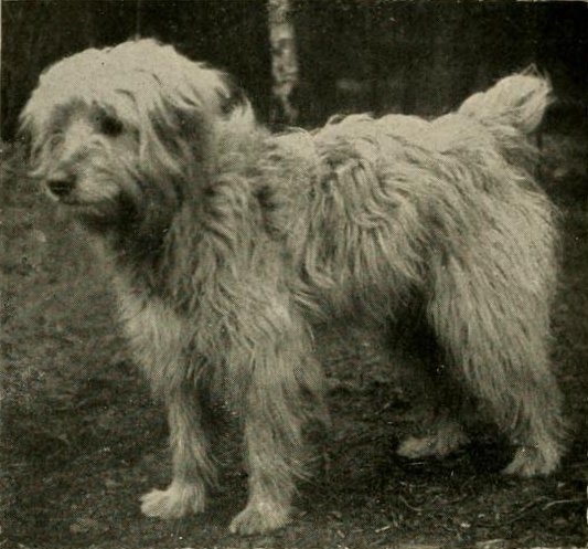 Originalbildunterschrift: Zotthaariger deutscher Schäferhund, sogenannter Schafpudel, aus dem Münsterland, Westfalen.